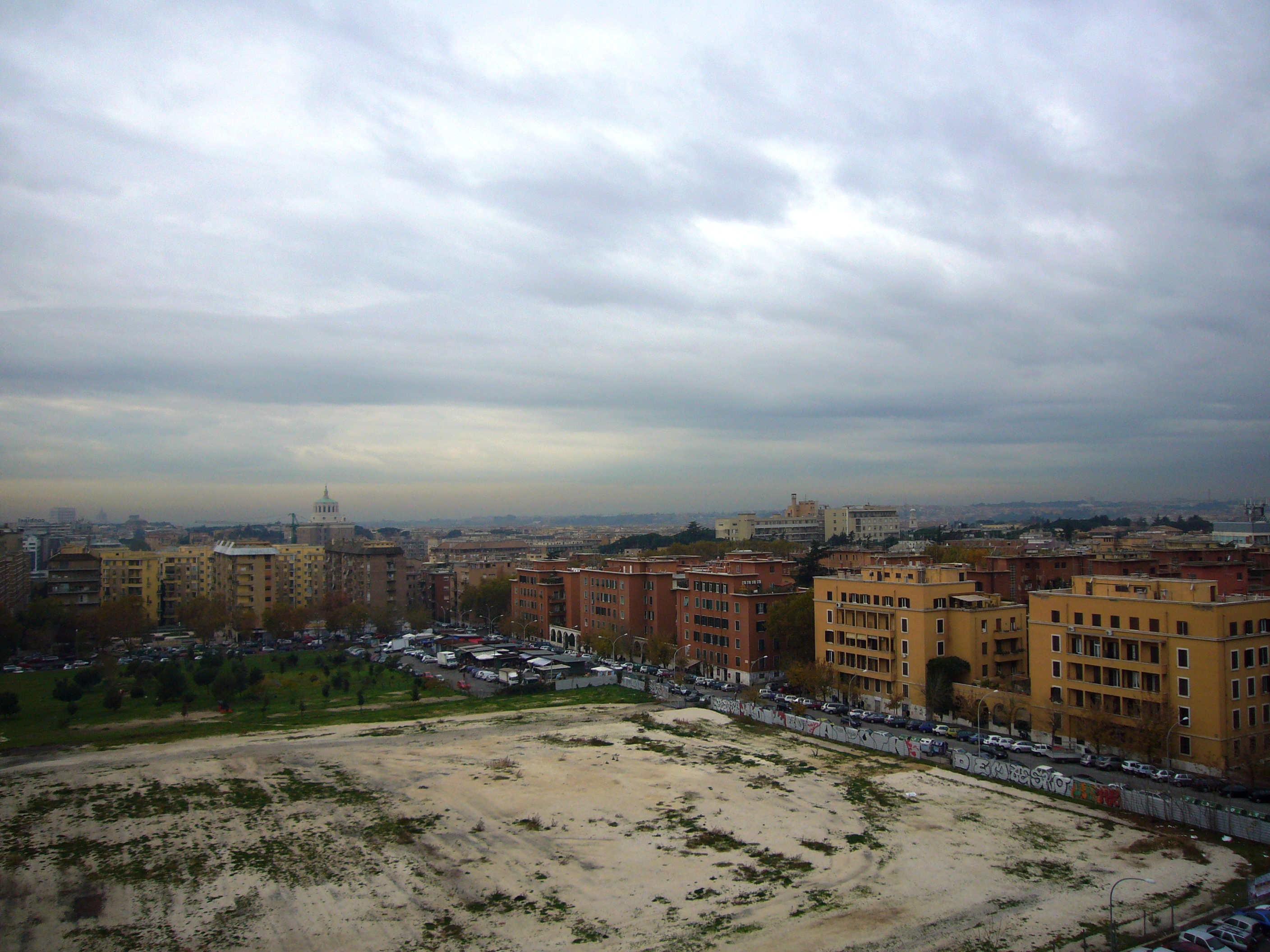 Roma, Garbatella nuova. Sullo spazio ancora non bonificato negli anni scorsi sono stati allocati dei circhi, ma attualmente è comunque destinato a verde e servizi di valenza locale. In mancanza di un'inizativa del Comune, i cittadini si stanno assumendo l'onere di bonificarlo e di piantare alberi. Seguitene le vicende nel tempo, tramite gli aggiornamenti di Google Maps!